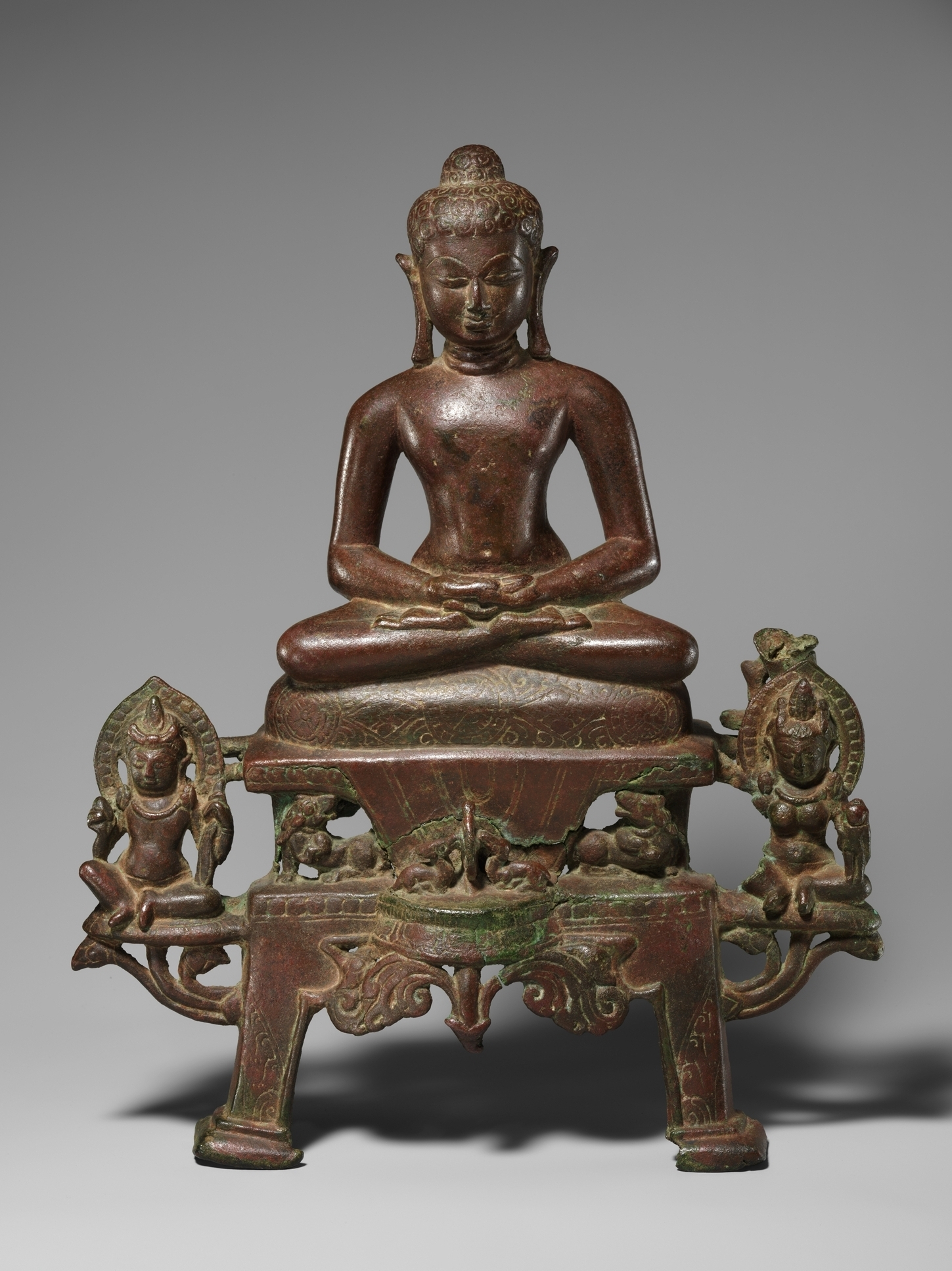 India (Gujarat, Akota); Figure; Sculpture